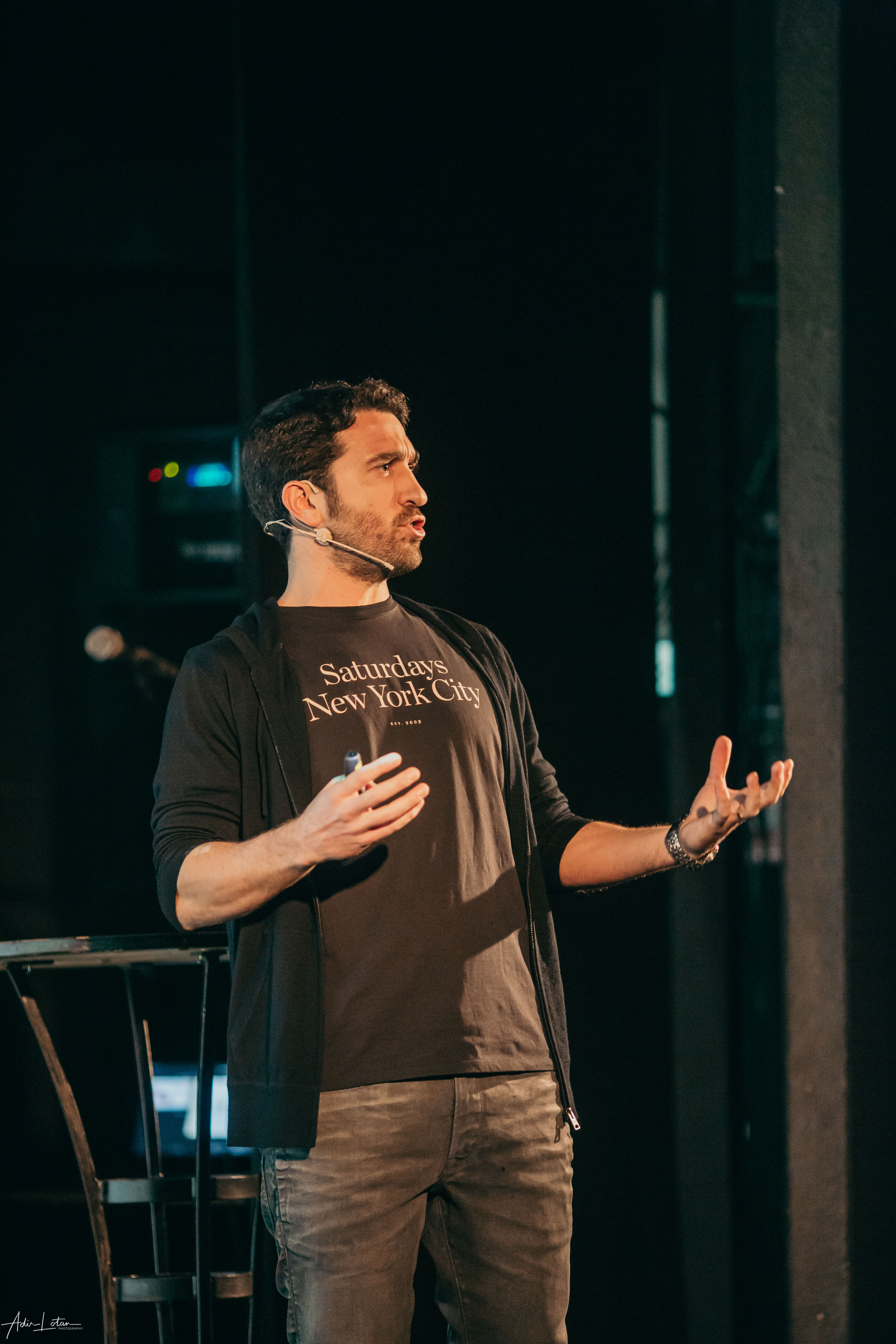 שחר בר דוד - הרצאה על הסיפור האישי- לאחר חופשה בתאילנד ופוסט שהעלה החליט לצאת עם הרצאה חדשה שמספרת את הסיפור האישי שלו אבל מהמקום של הקשיים והכישלונות שעבר. ההרצאה היתה בבית ציוני אמריקה ביומולדת שלו 6/1/20 שתוך 48 שעות נחטפו 200 כרטיסים להרצאה.